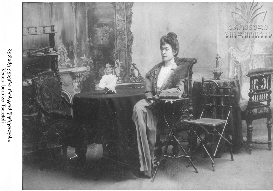 ბერიძე ვენერა როსტომ წერეთლისა